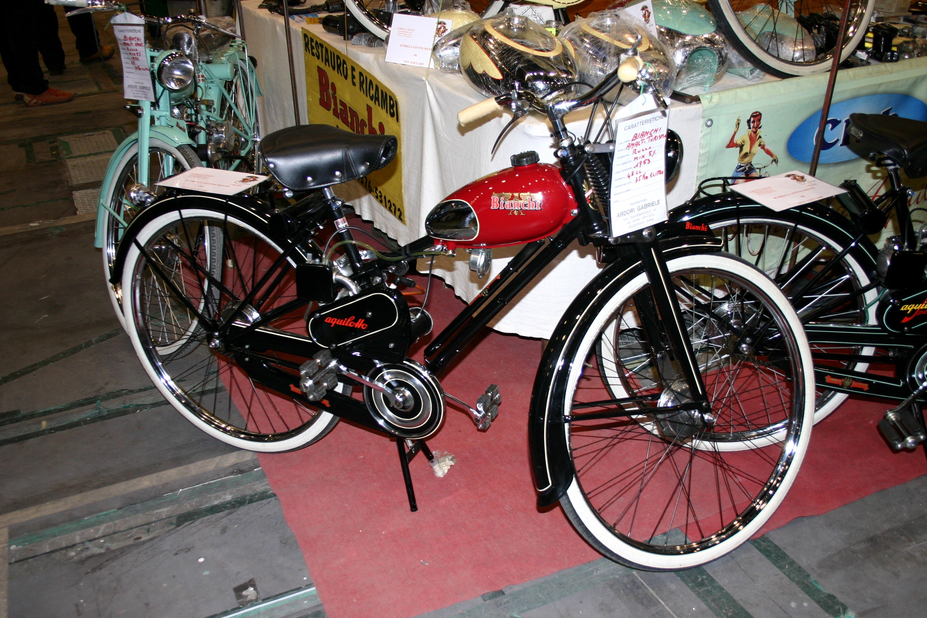 Un ciclomotore Bianchi Aquilotto del 1953. Cilindrata 48 cc. foto scattata da me a Padova il 25.10.08